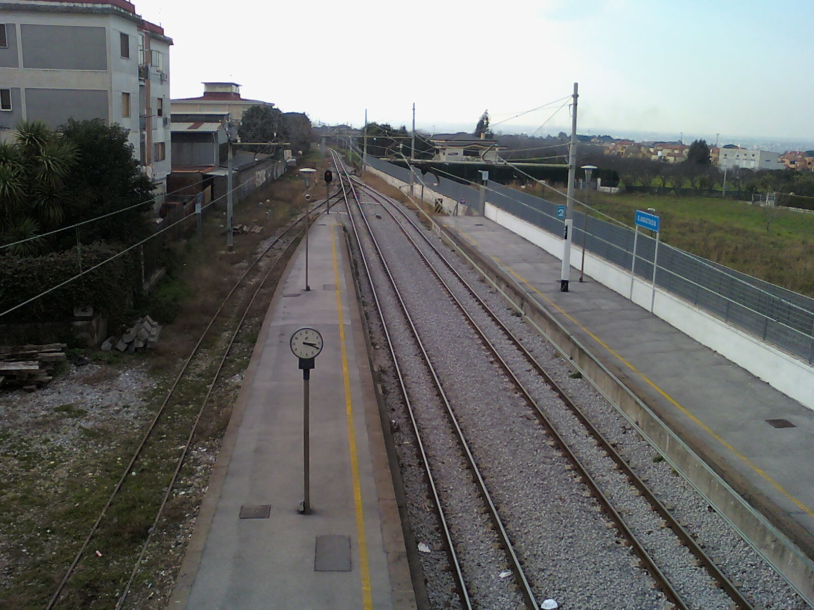 immagine di mia proprietà (Lusb)